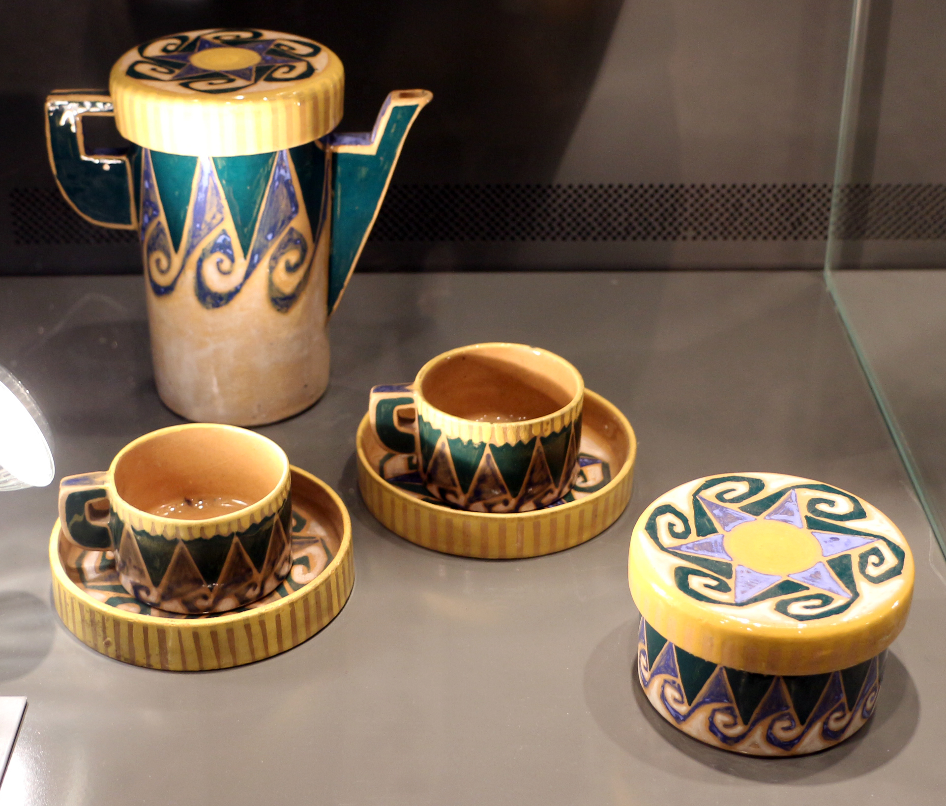 Il parco e i musei di Nervi This is a photo of a monument which is part of cultural heritage of Italy.